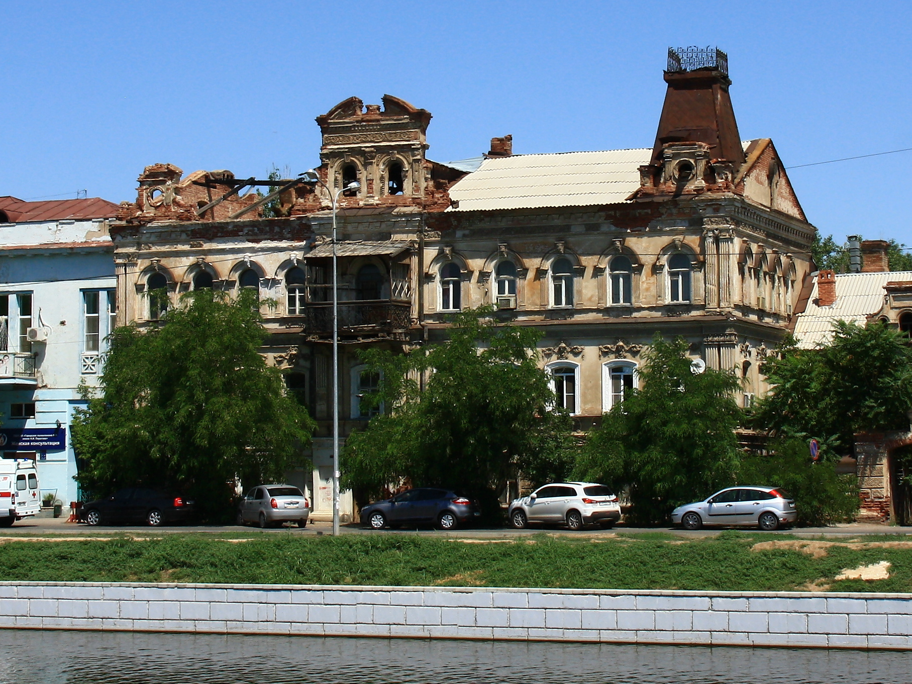 Дом м. с. саркисова (Астраханская область, Астрахань, красная наб., 33)